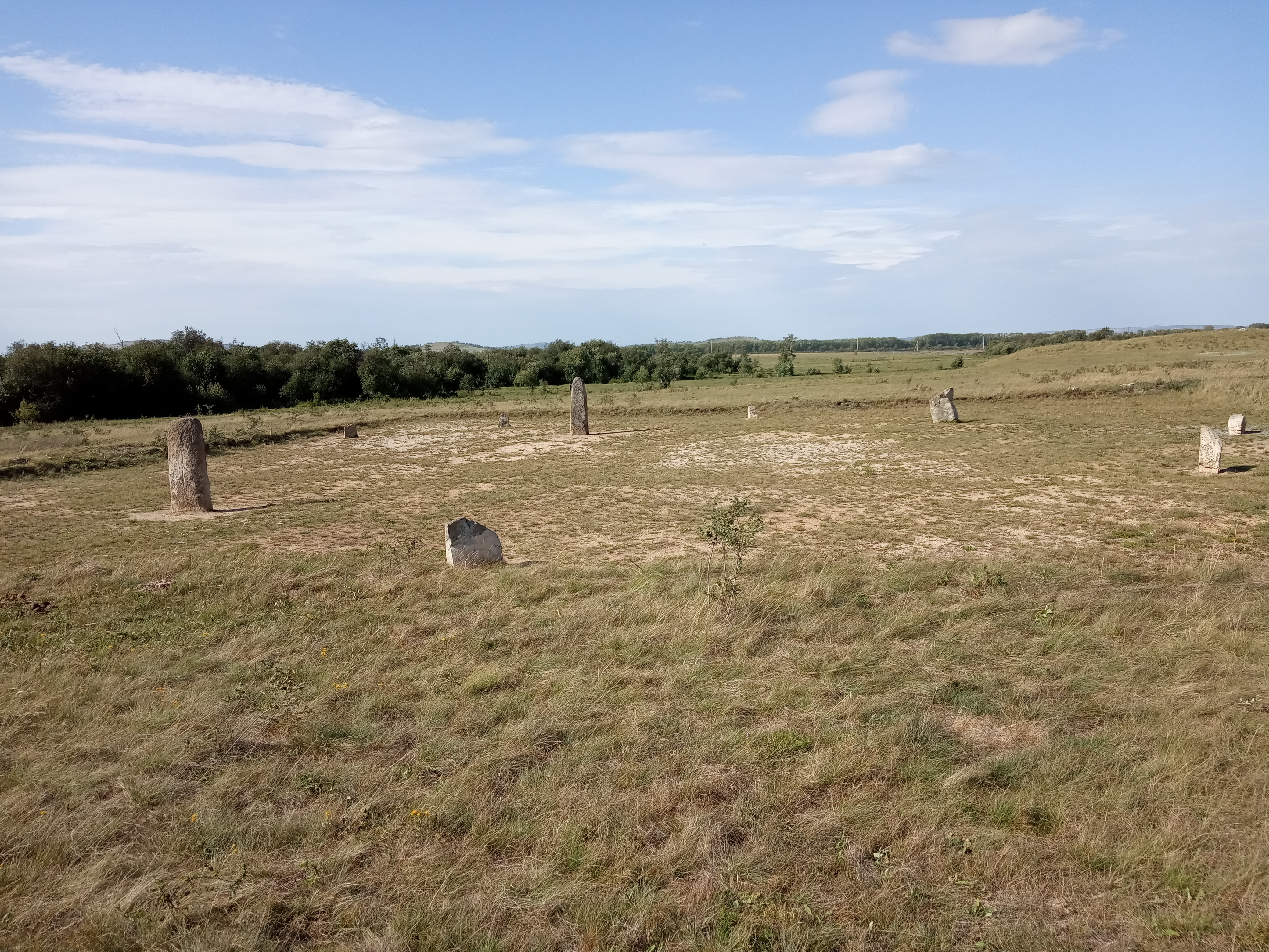 Башҡортса: Учалы районы Ахун ауылы